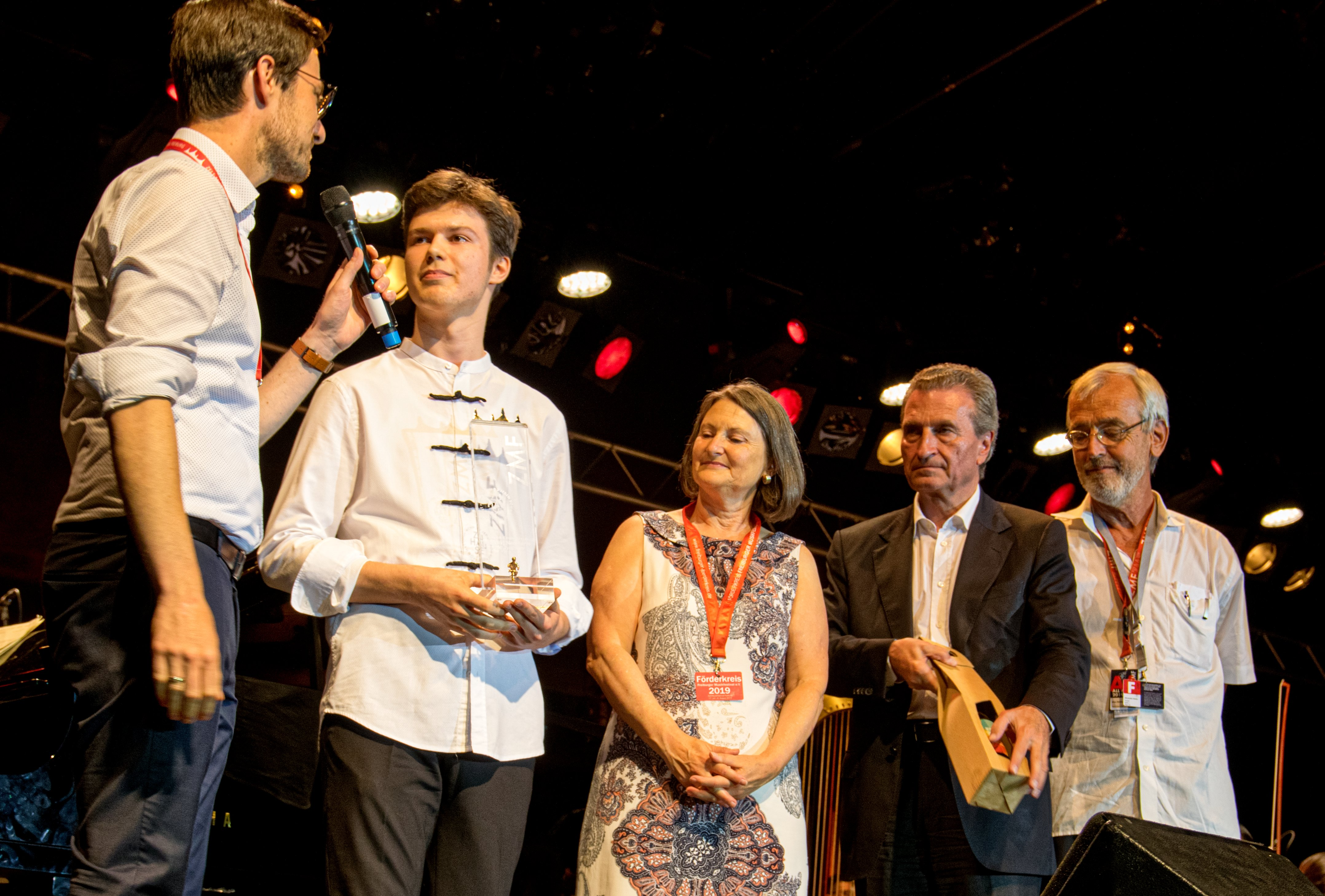 Bilder vom Zelt Musik Festival 2019 in Freiburg im Breisgau Die Gala "La Fiesta" Die Preisverleihung an Robert Neumann